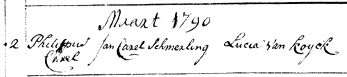 Geboorteakte van Philippe-Charles Schmerling